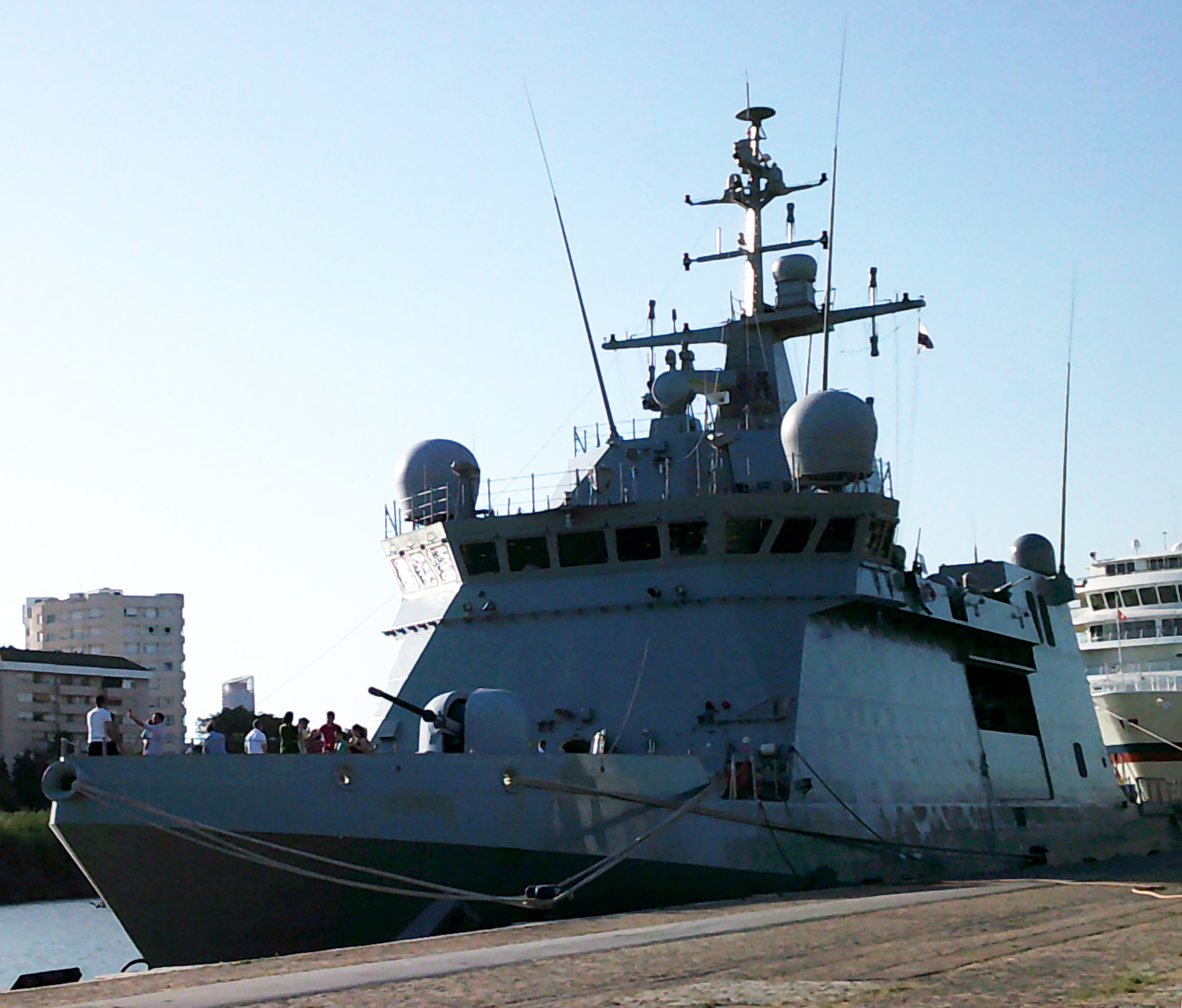 P45 Audaz. Muelle de las Delicias. Sevilla, Andalucía, España.